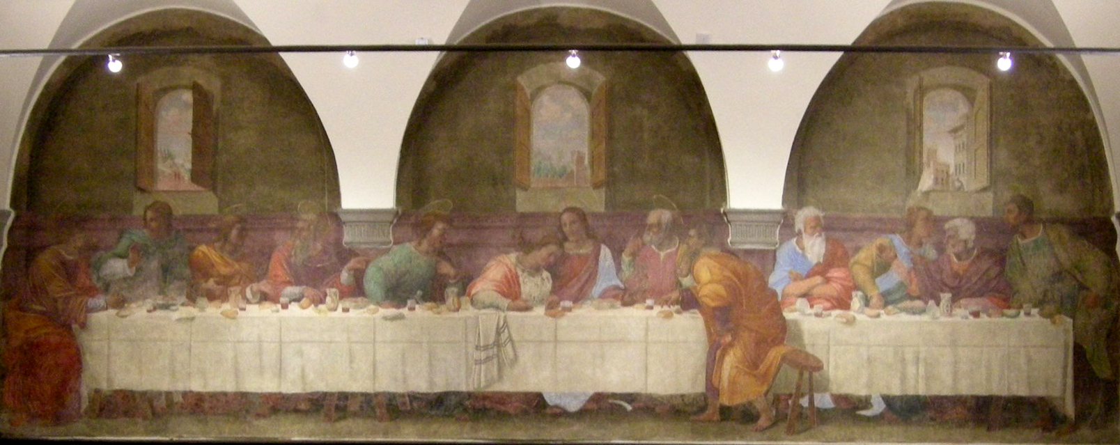 Cenacolo by Franciabigio, convento della Calza in Florence, Italy